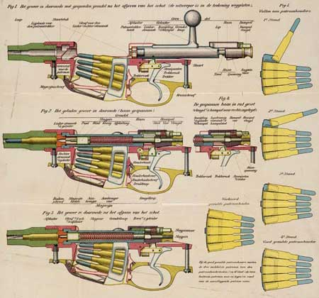 Instructieplaat werking magazijn beaumontgeweer dat veel in de Atjeh-oorlogen door de onder Nederlandsbevel staande troepen werd gebruikt.